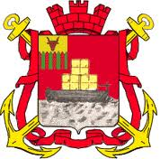 Герб Мысовска, Забайкальская область, 1913 (ныне Бабушкин, республика Бурятия)